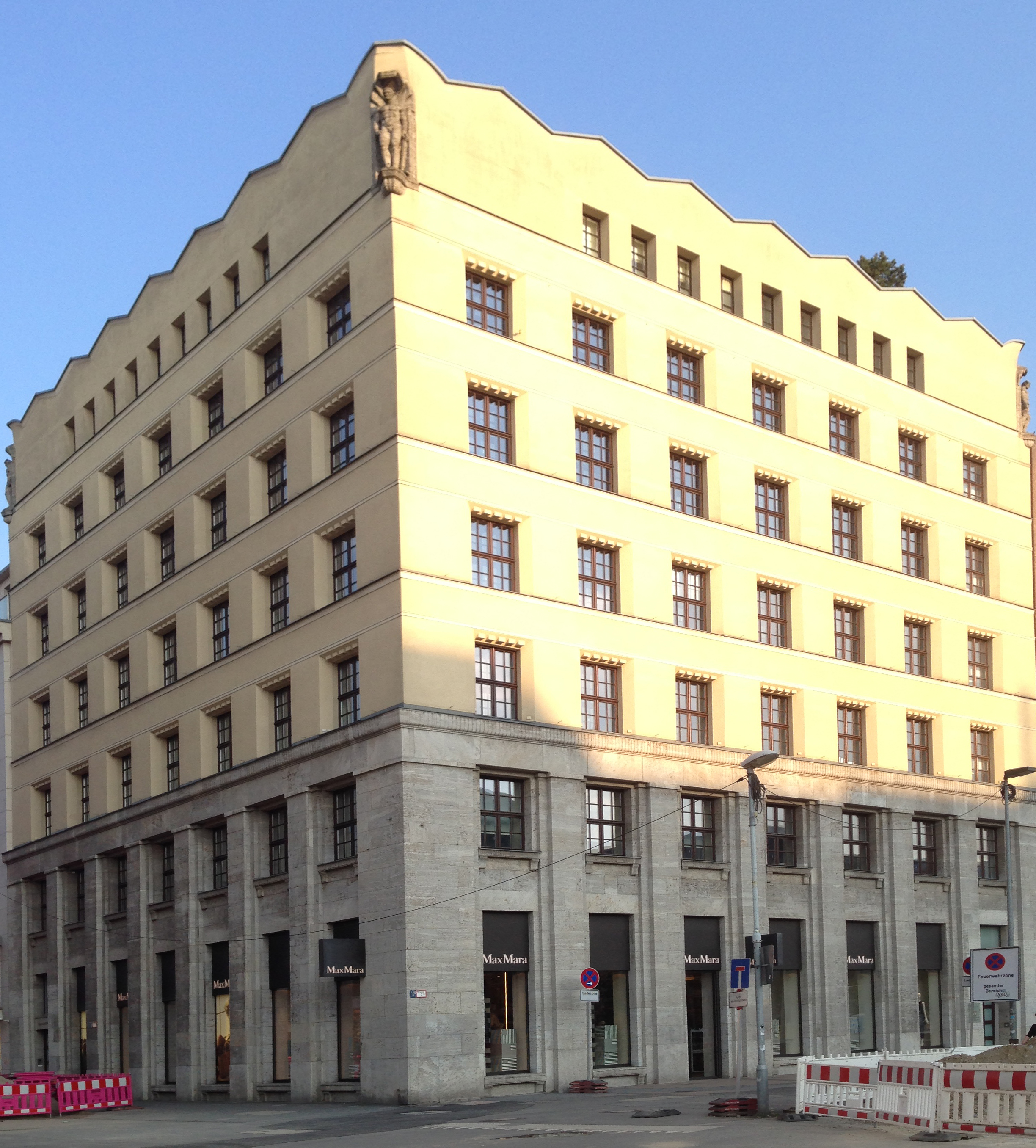 Gebäude Königsallee 4, Düsseldorf, Baujahr 1924 bis 1925 – Moritz und Betten